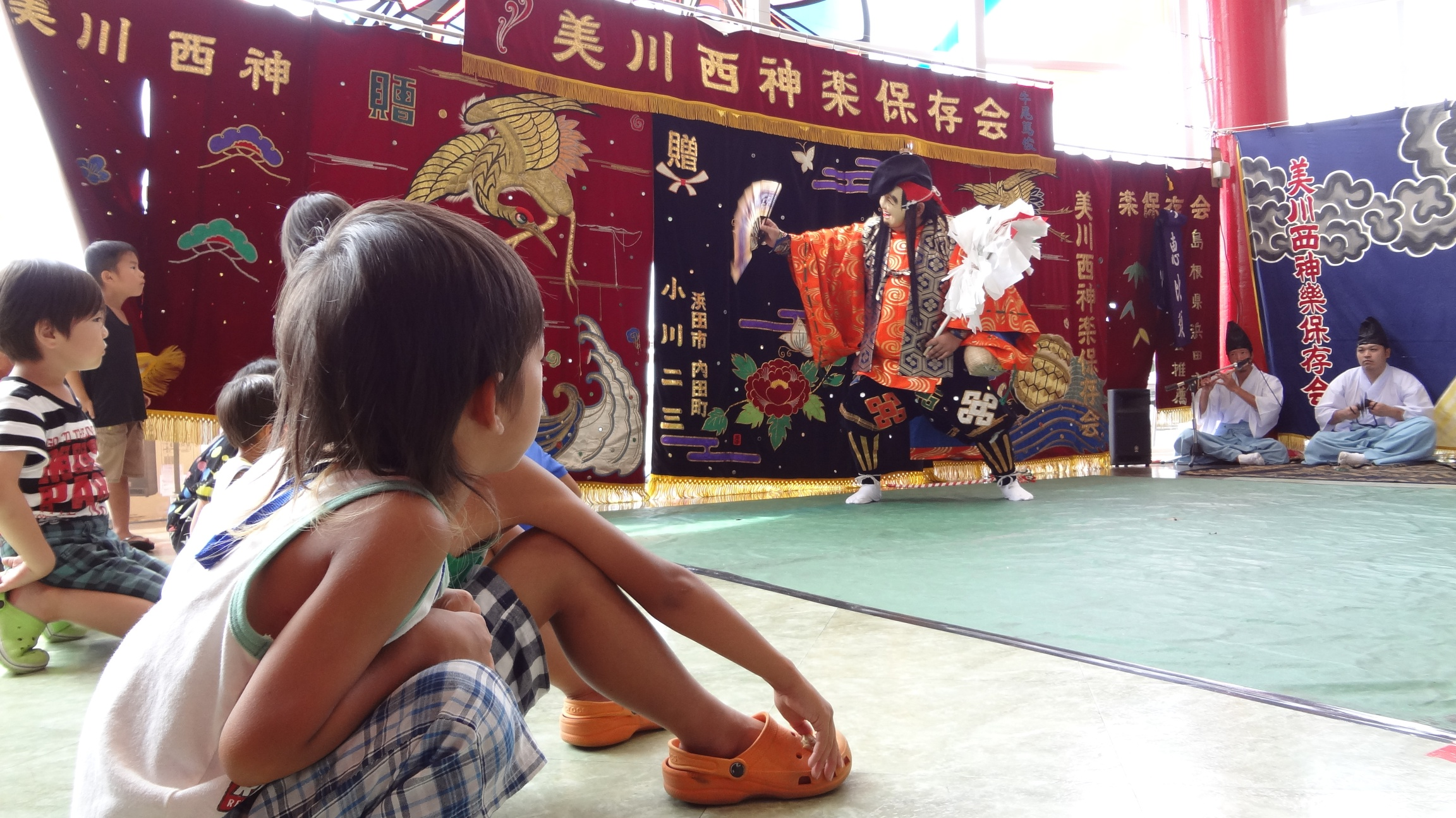 石見神楽・演目は恵比須。美川西神楽保存会（島根県浜田市）。えびす神が鯛釣りする様を舞う演目。撒餌に見立てて飴などの菓子を撒くため子供達に人気で、皆かぶりつきで観ている。